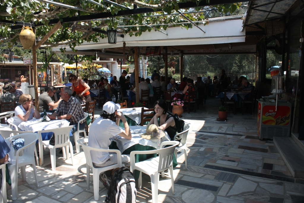 In einer Taverne auf Korfu